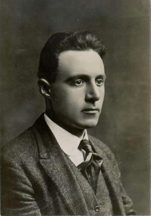 Lovro Klemenčič (1891-1928)